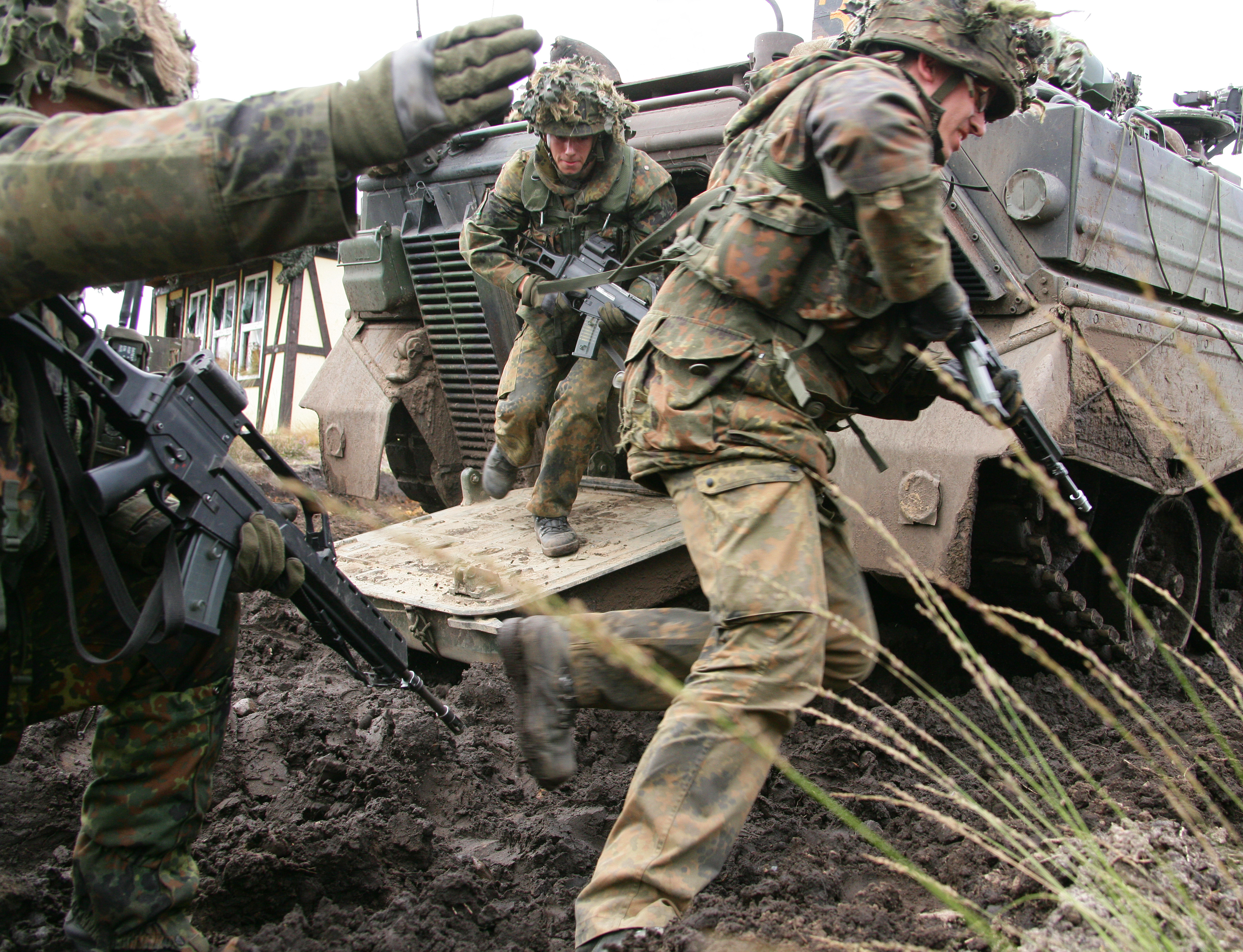 Panzergrenadiere des Panzergrenadierlehrbataillons 92 nach dem Wechsel der Kampfweise.Der Schützenpanzer Marder 1A3 wird von den Soldaten als Deckung genutzt.Panzergrenadiere des Panzergrenadierlehrbataillons 92 beim Vorüben im Rahmen der Informationslehrübung Heer am Ausbildungszentrum Munster. ©Bundeswehr/Rott